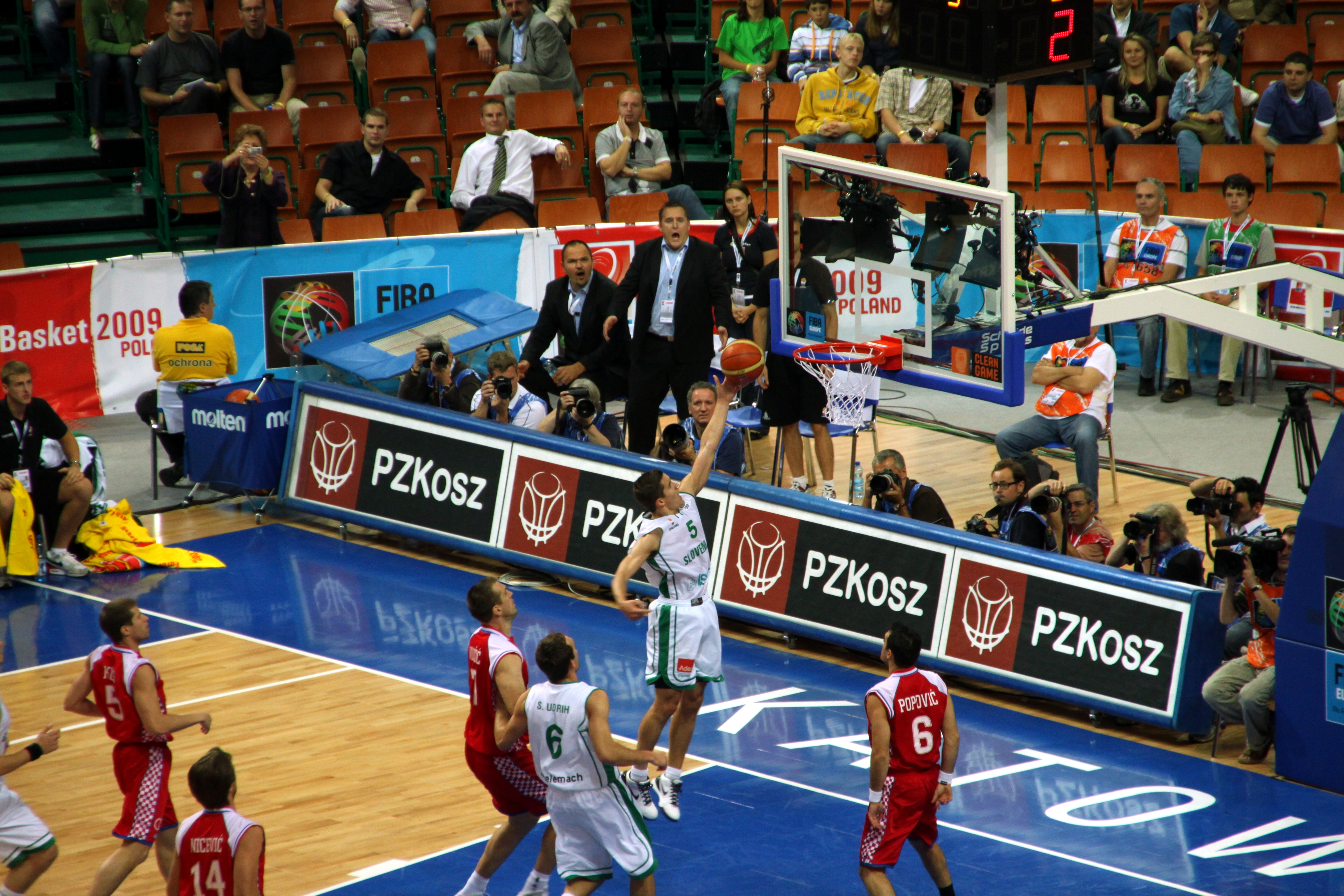 Slovenia - Croatia at Eurobasket 2009